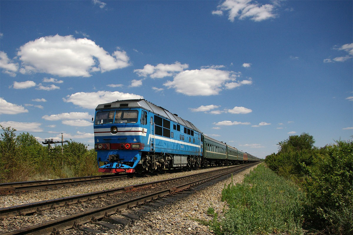 Тепловоз ТЭП70-0331 под Белой Калитвой